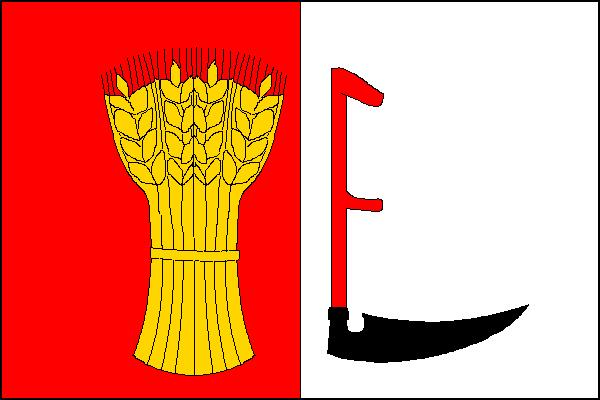 Vlajka obce Malhostovice